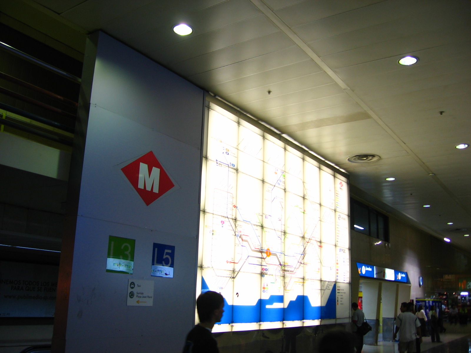 Sants Estació station, Barcelona Metro/Estació Sants Estació, Barcelona